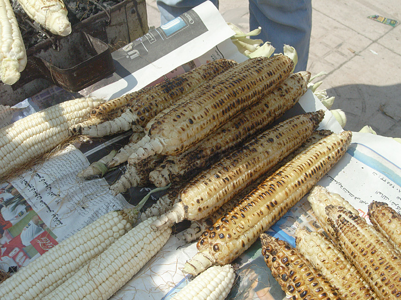 Geröstete Maiskolben